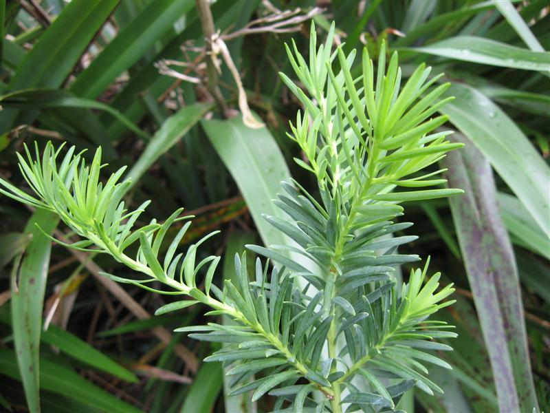 Halocarpus kirkii, Monoao.